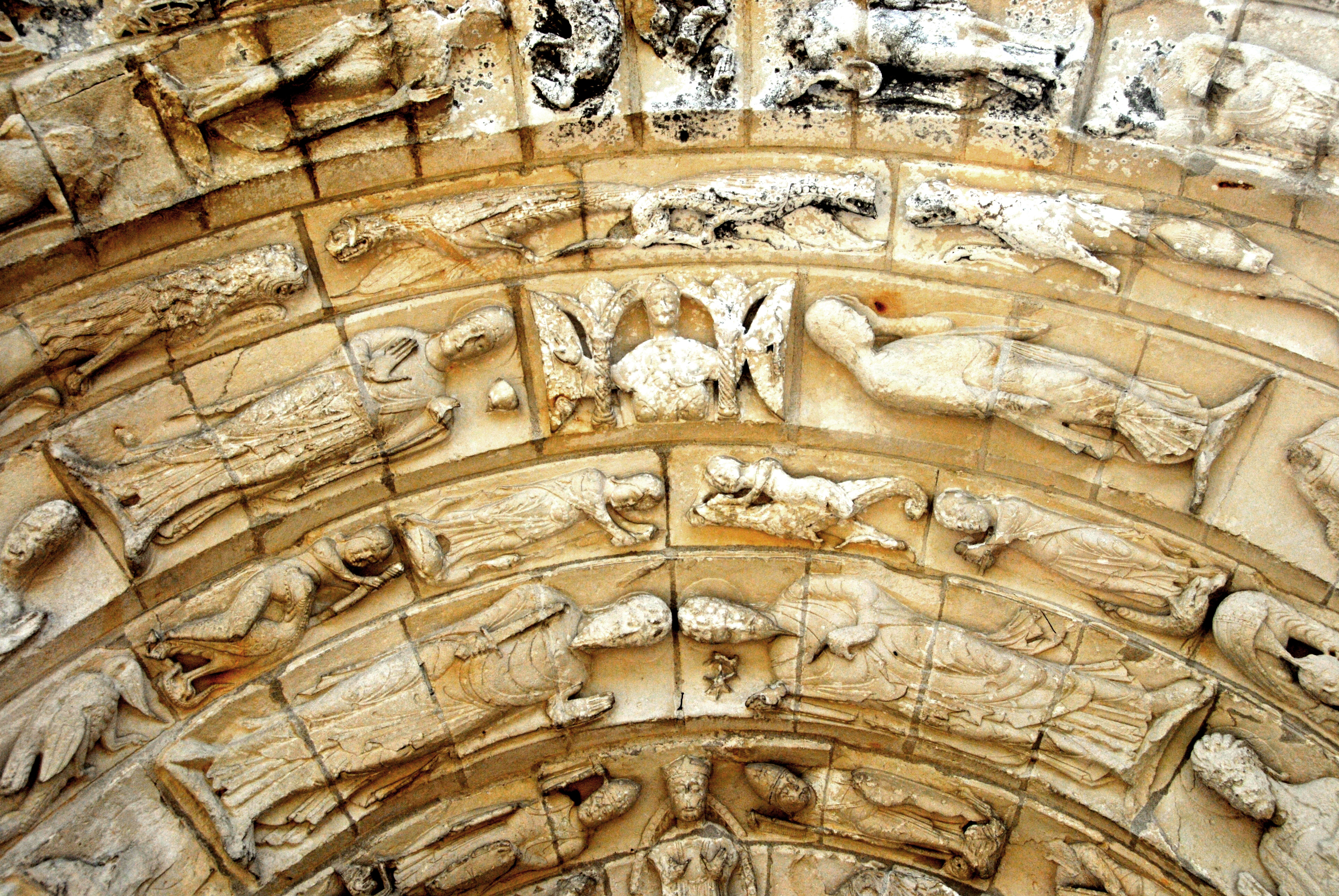 Chadenac, Portal, Archivolten - Detail